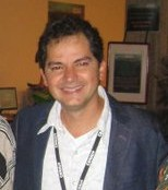 Carlos Saldanha au festival d'animation d'Annecy 2011